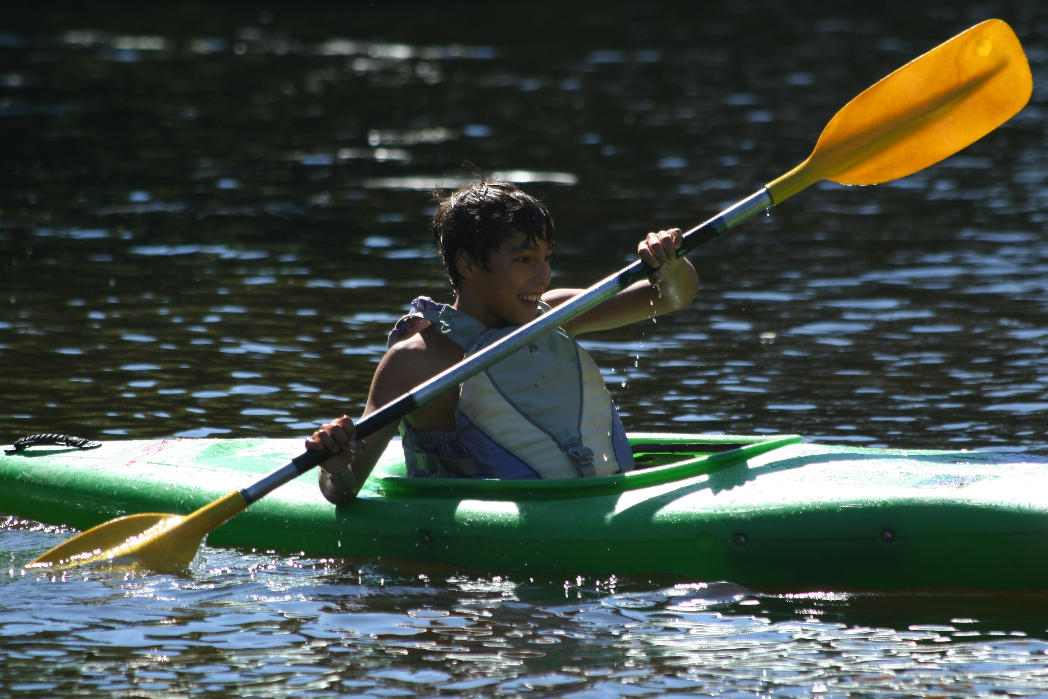 Campamento Finca las Pavas